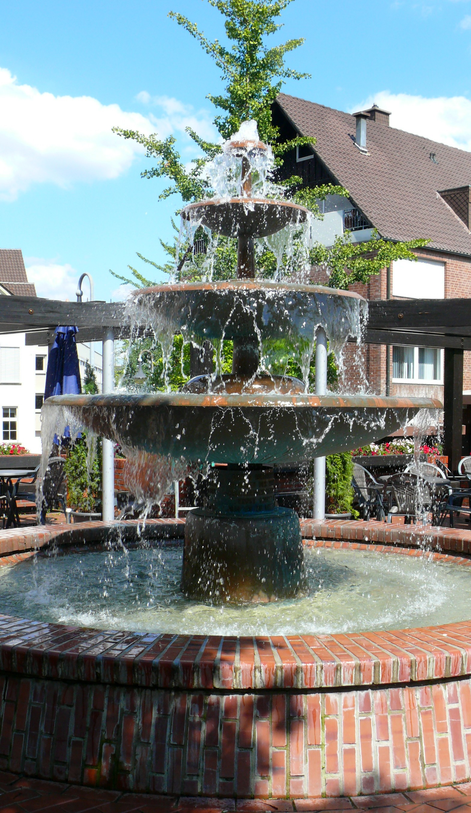 Bierbrunnen, an dem jährlich das Bierbrunnenfest veranstaltet wird.